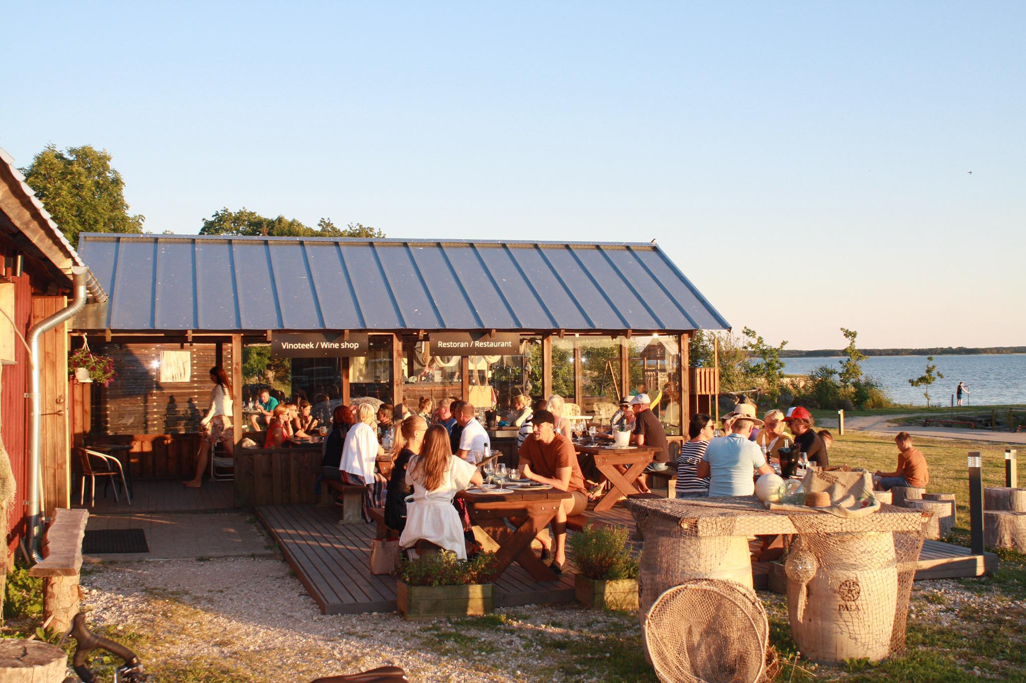 Koguva sadama restoran Noodakuur